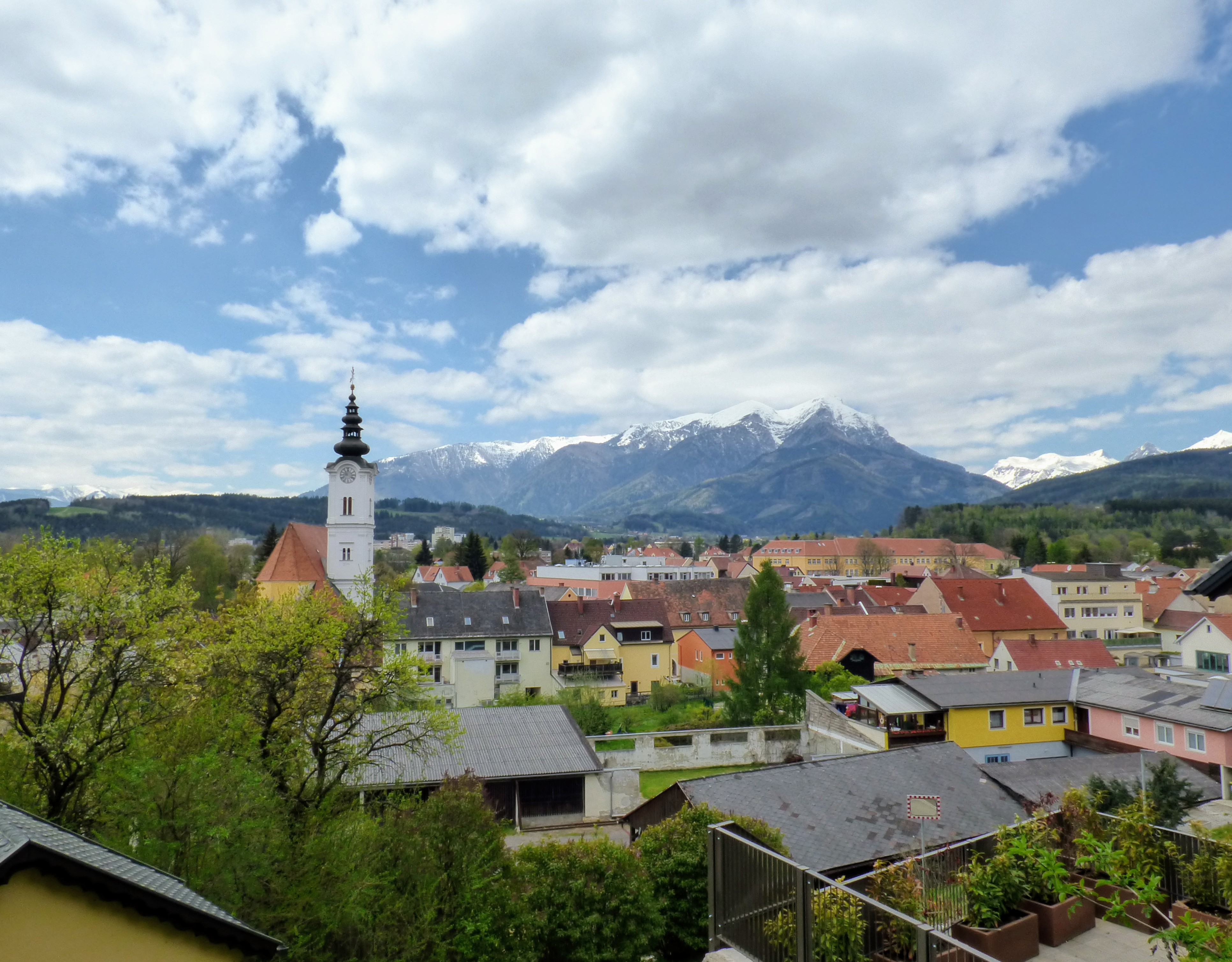 Trofaiach, links die Dreifaltigkeitskirche, im Hintergrund der Reiting-Bergstock